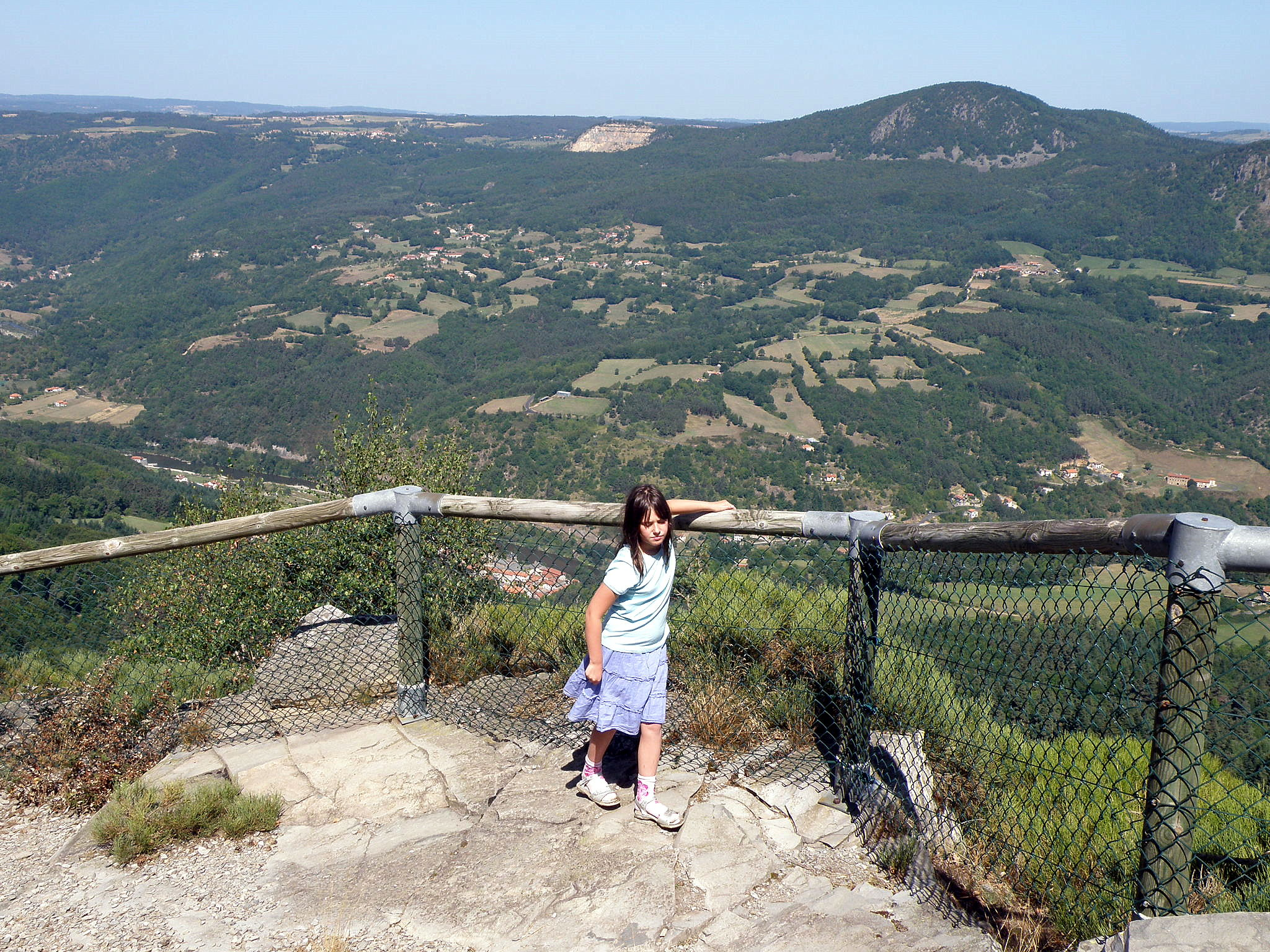 Roche-en-Régnier, comm. de la Haute-Loire, France (Auvergne). Vue prise depuis la table d’orientation du mont Gerbizon, située dans la comm. de Chamalières-sur-Loire à une alt. d’env. 930m, en direction du nord-ouest, c’est-à-dire vers la vallée de la Loire et, au-delà, vers la comm. de Roche-en-Régnier. Nous apercevons ainsi : - au milieu de la photo, à gauche de la fillette, derrière le treillis de la rambarde, le village de Chamalières-sur-Loire, dont on distingue vaguement l’église abbatiale ; - la Loire, dans la moitié gauche, coulant de gauche à droite ; - à droite de Chamalières, sur la rive opposée (gauche) de la Loire, le hameau de Viaspre, appartenant à la comm. de Chamalières ; - plus loin, sur les hauteurs au centre, le hameau de Mans (Mans-Haut et Mans-Bas), appartenant à la comm. de Roche-en-Régnier ; - env. à la même hauteur, plus à droite, le hameau de Tarrier, faisant partie ég. de la comm. de Roche-en-Régnier ; - derrière Tarrier se dessine contre le ciel la silhouette arrondie du mont Miaune (alt. 1066m.), point culminant de Roche-en-Régnier ; - contre le bord droit de la photo, le flanc occidental du suc de Chaumont (alt. 941m.), situé dans la comm. de Retournac ; - la carrière près de la Roche du Diable (comm. de Roche-en-Régnier), se présentant comme une grande plaie dans la montagne, à gauche du sommet du mont Miaune ; - à la même hauteur que cette carrière, entre celle-ci et le bord gauche de la photo, le bourg de Roche-en-Régnier, sis au pied d’un petit piton rocheux gris sombre portant à son sommet un donjon circulaire, visible comme un petit rectangle clair.